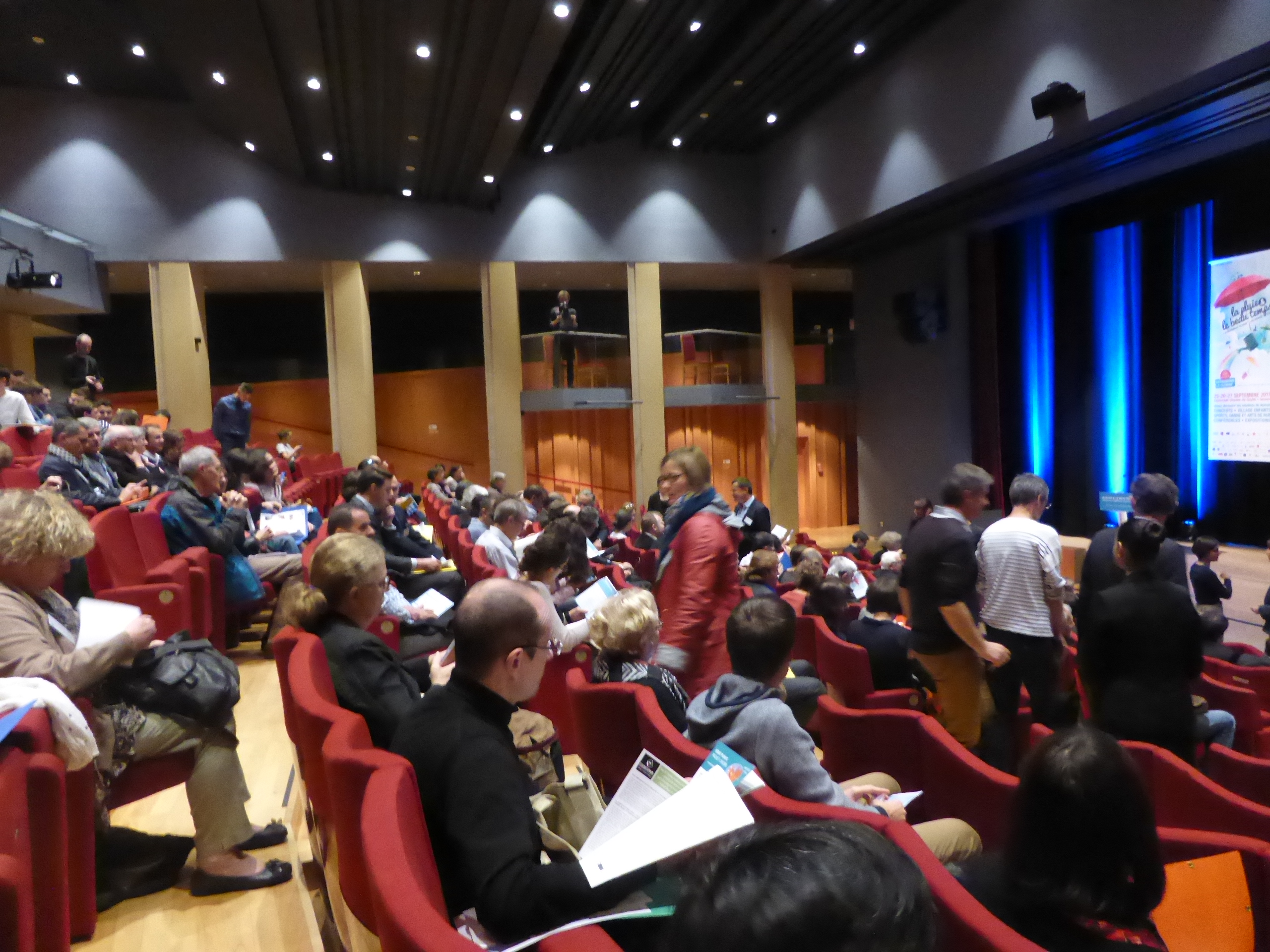 Colloque Refaisons le climat / la pluie et le beau temps à Rennes